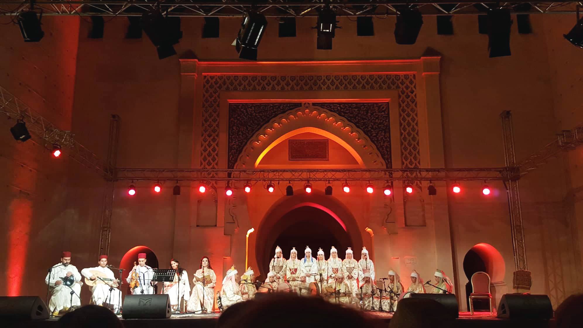 حفل في مهرجان الموسيقى الروحية بمدينة فاس، المغرب سنة 2018